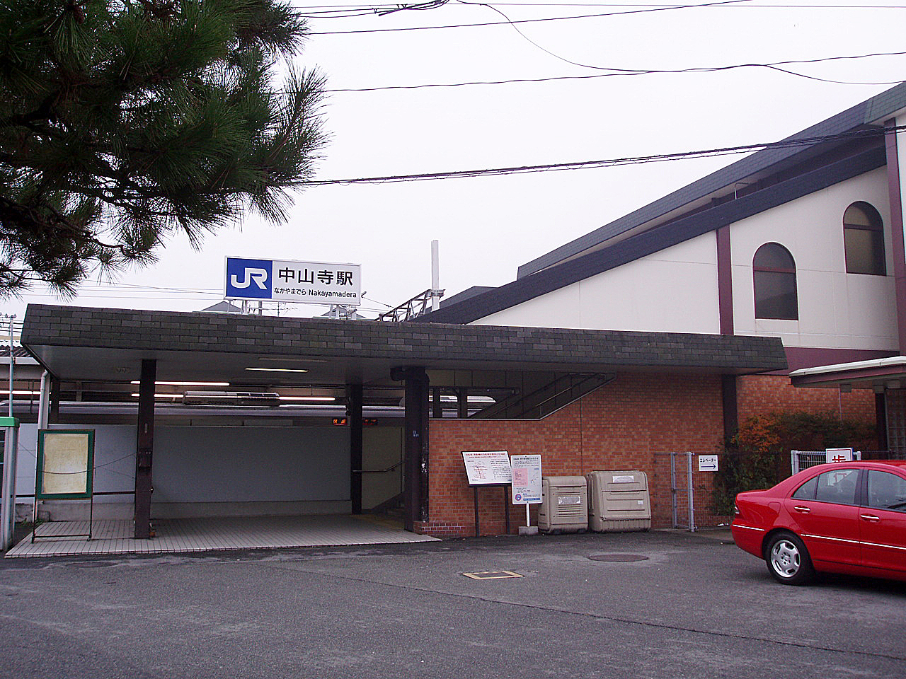 West Japan Railway Fukuchiyama Line（JR Takarazuka Line） Nakayamadera Station Building North Gate 西日本旅客鉄道 福知山線 中山寺駅駅舎 北出口